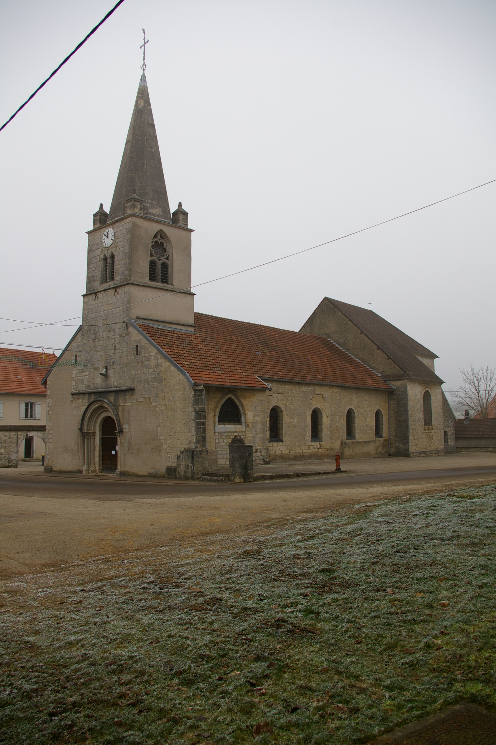 L'église vue du Sud-Ouest. On distingue sont portail roman